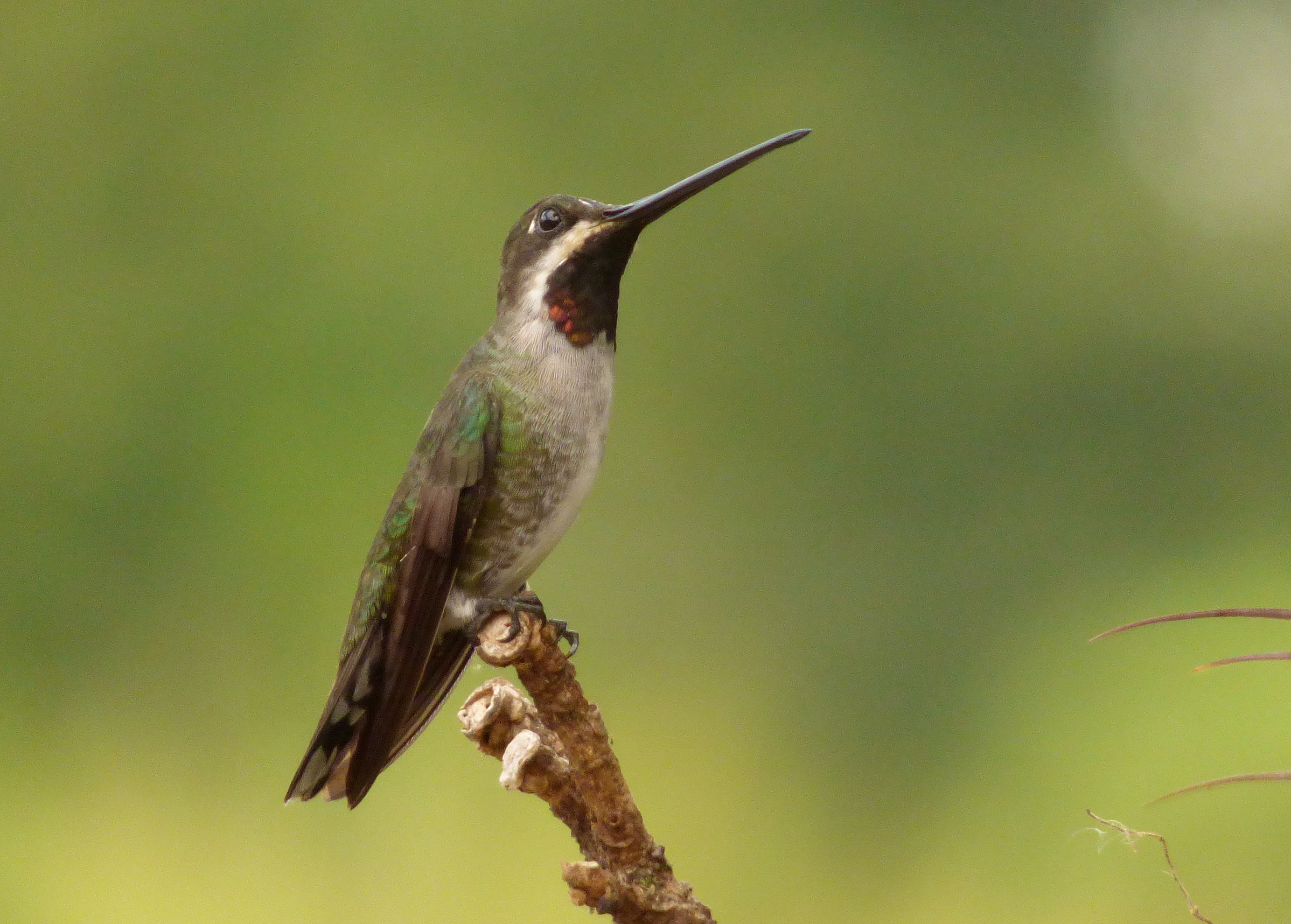 Heliomaster longirostrus (Picudo coronado)